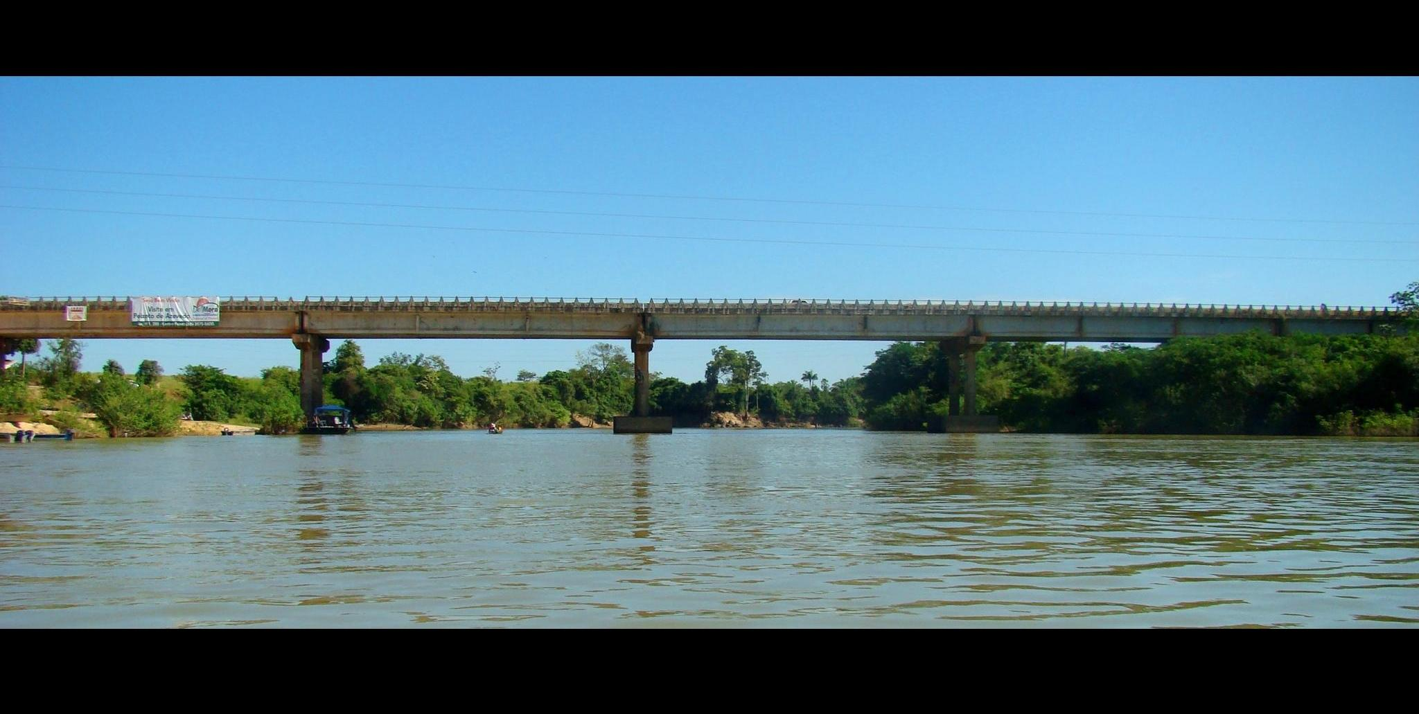 Ponte sobre o Rio Peixoto Foto: James Deann